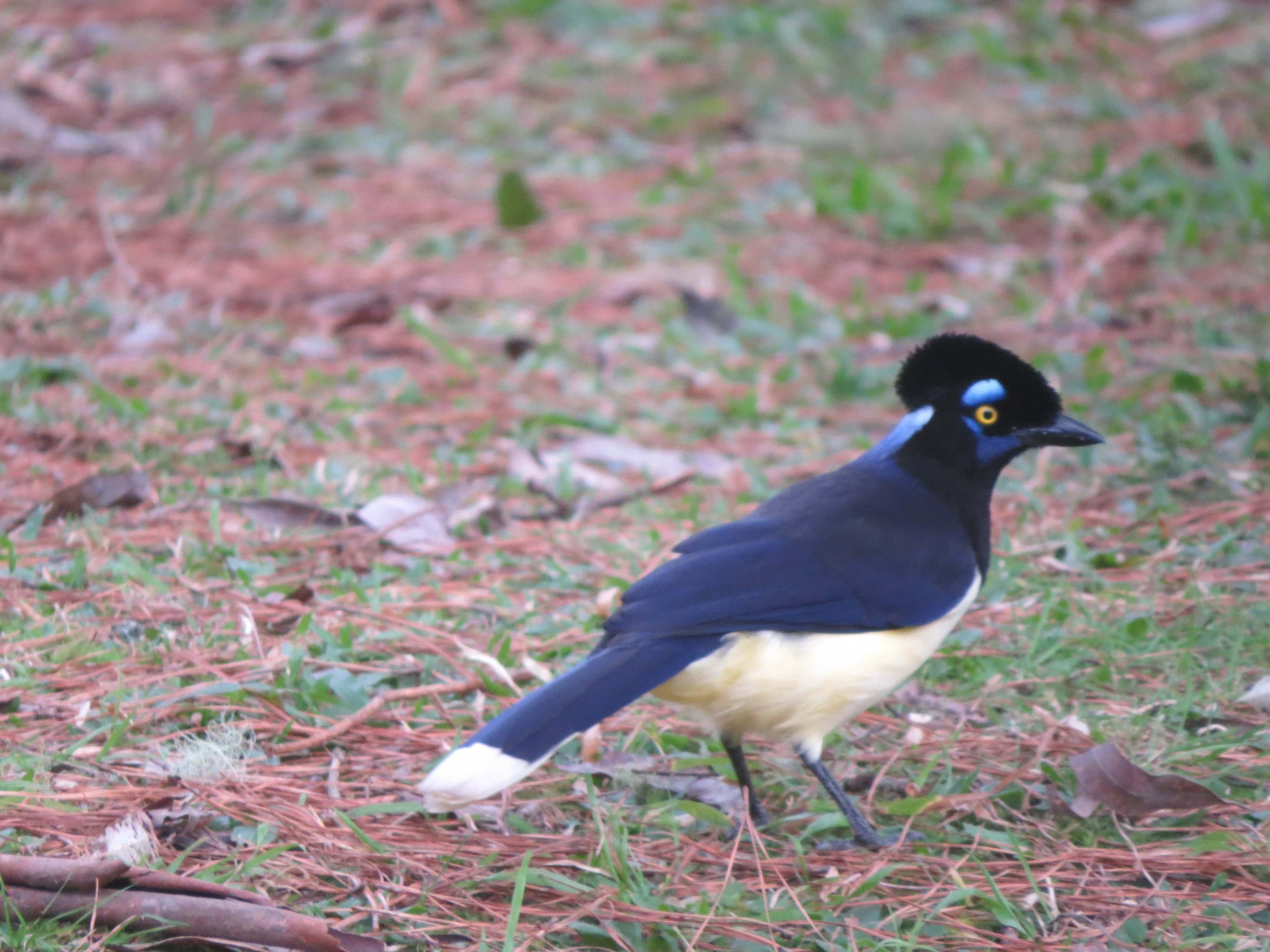 Uma gralha-do-campo (Cyanocorax cristatellus), fotografada no Parque.